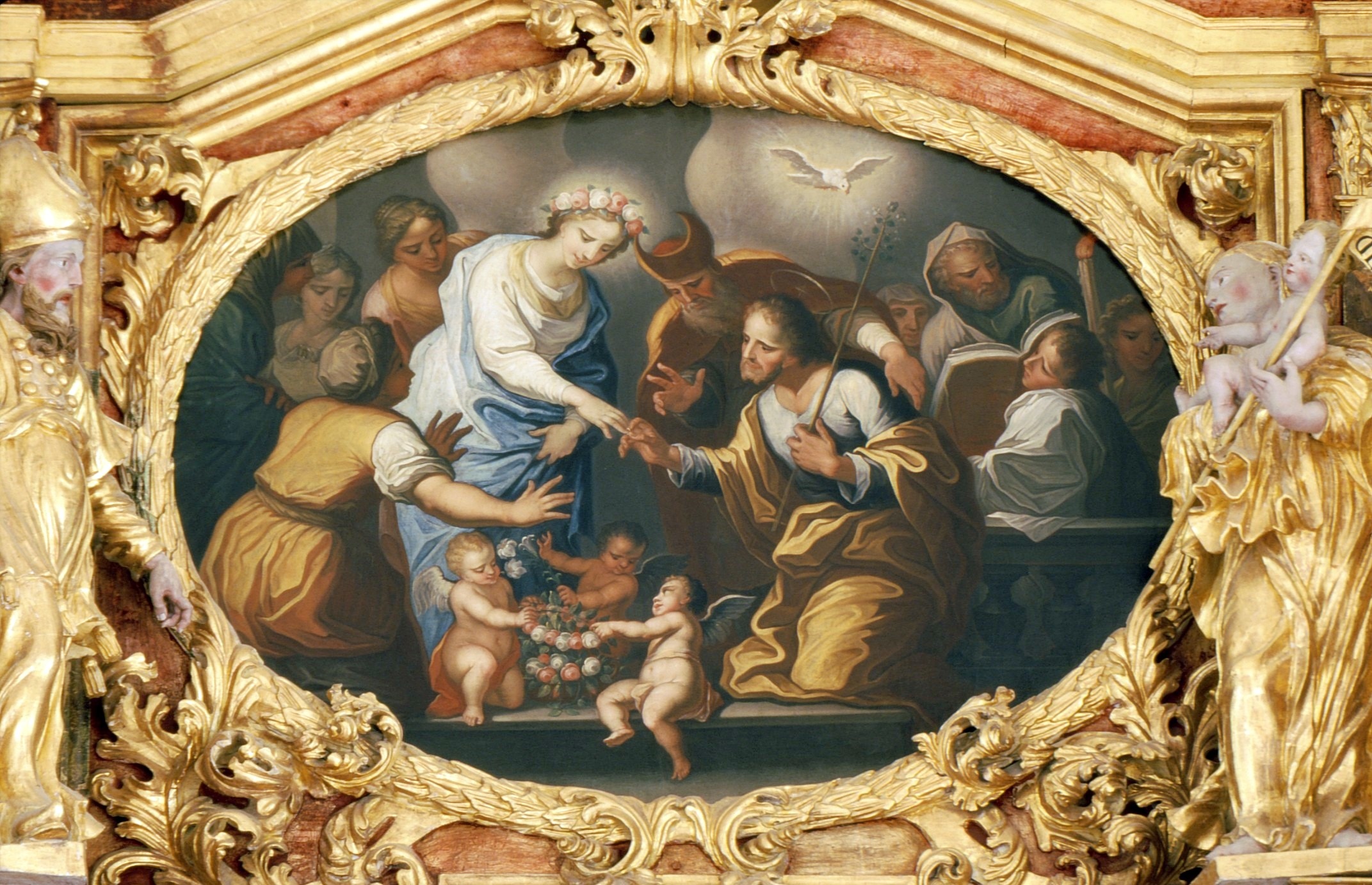 Johann Heel "Verlobung Mariens mit Josef" Bichelbach, Zunftkirche